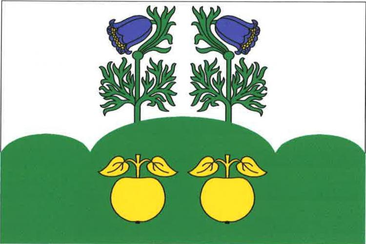 vlajka, Hlinná , okres Litoměřice